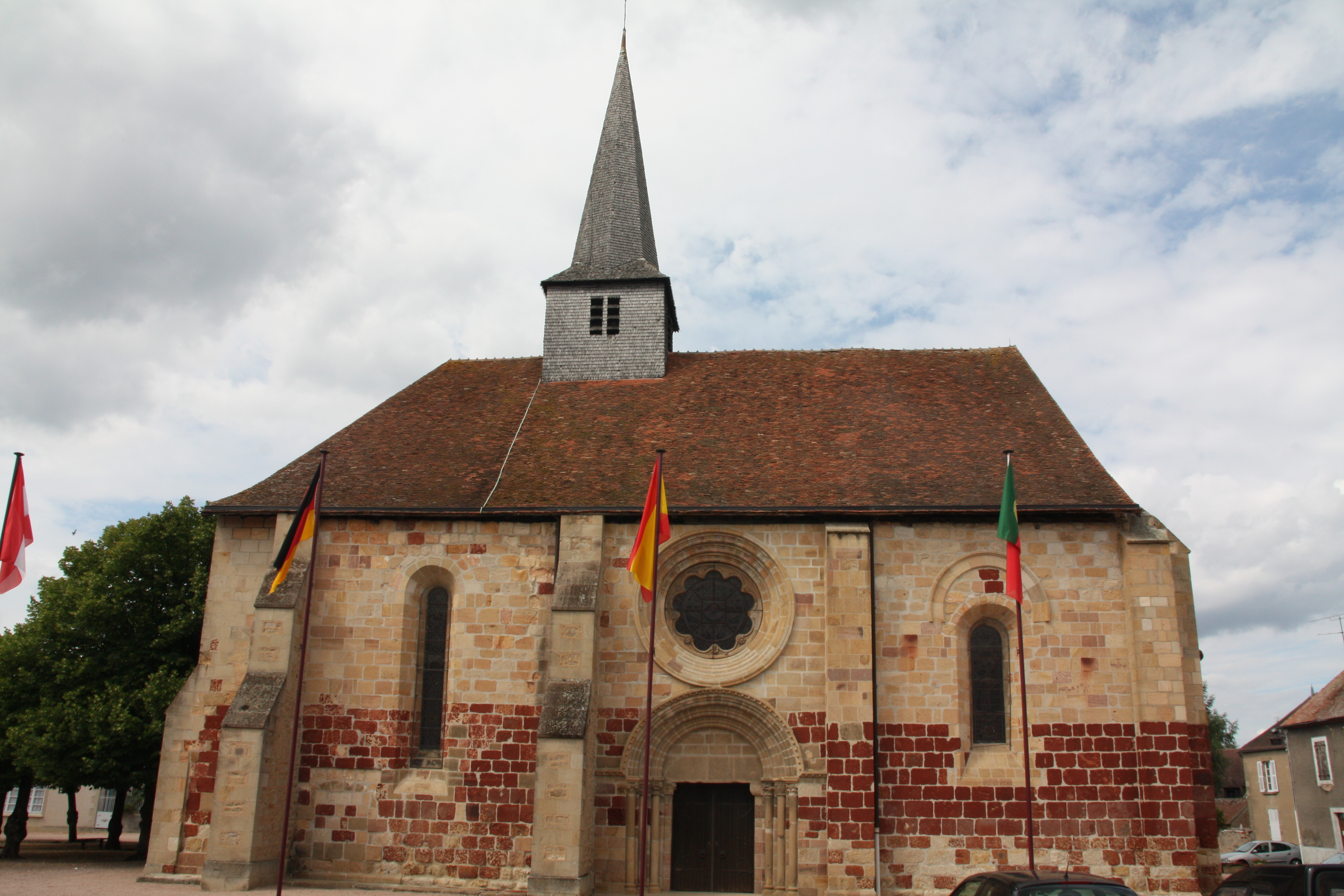 Église Saint-Jacques-le-Majeur à Villefranche d'Allier